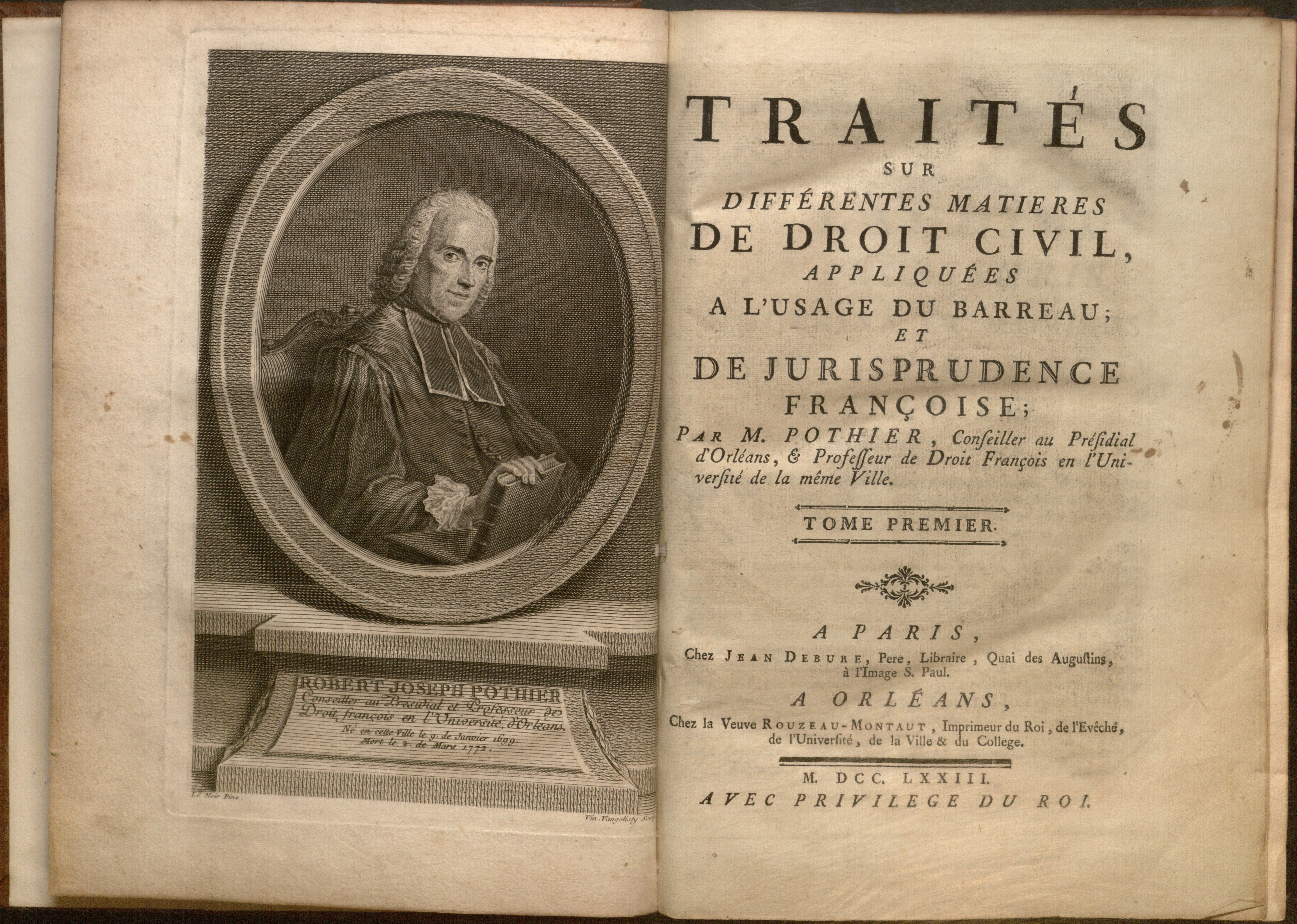 Traités sur différentes matieres de droit civil